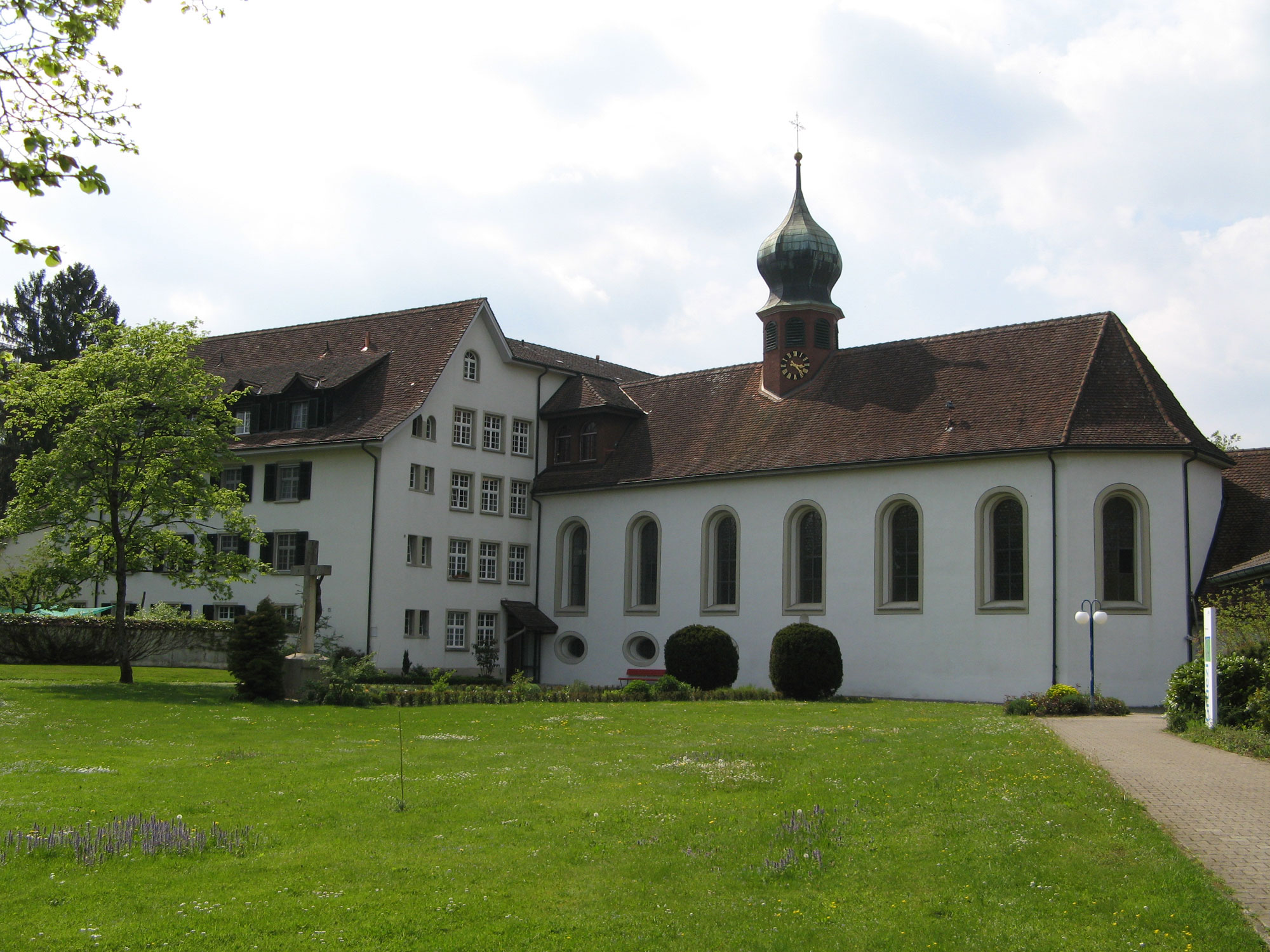 Kloster Gnadenthal: Klosterkirche und älterer Teil des Pflegeheims